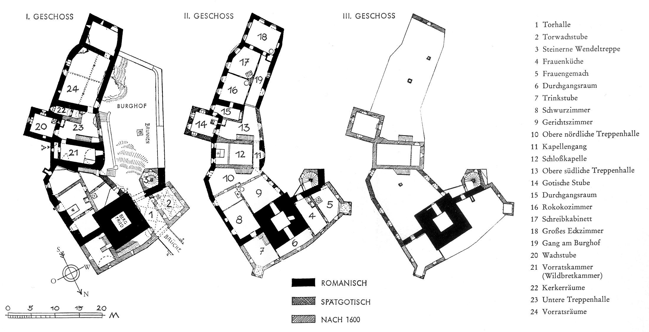 Grundriss der Burg Prunn auf einer öffentlich zugänglichen Informationstafel an der Burg